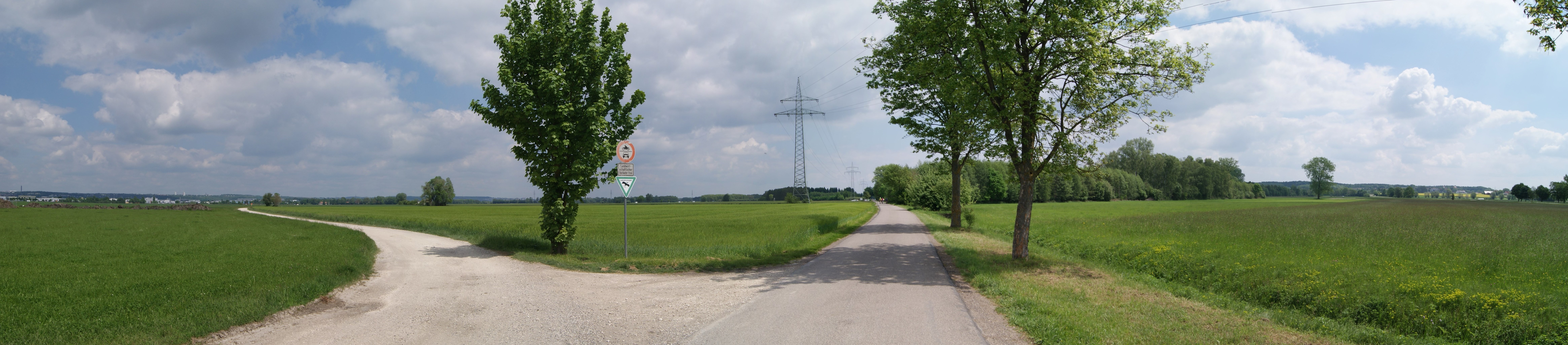 Finninger Ried (links) und Bauernried (rechts)